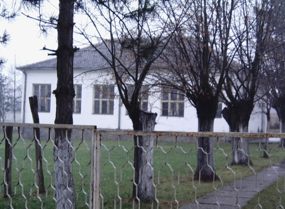 Школа у Звиздару.